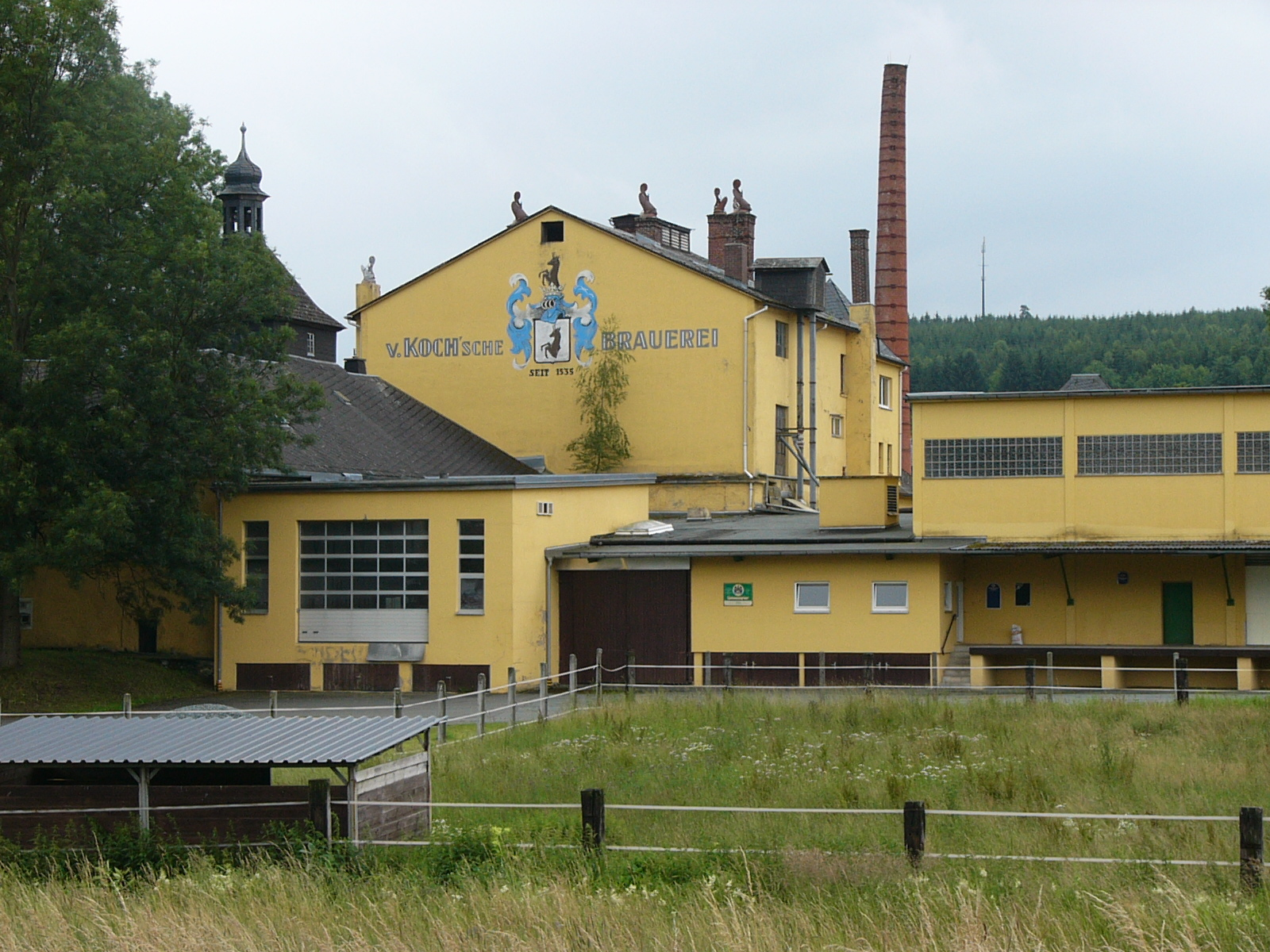 Schloßbrauerei Gottsmannsgrün